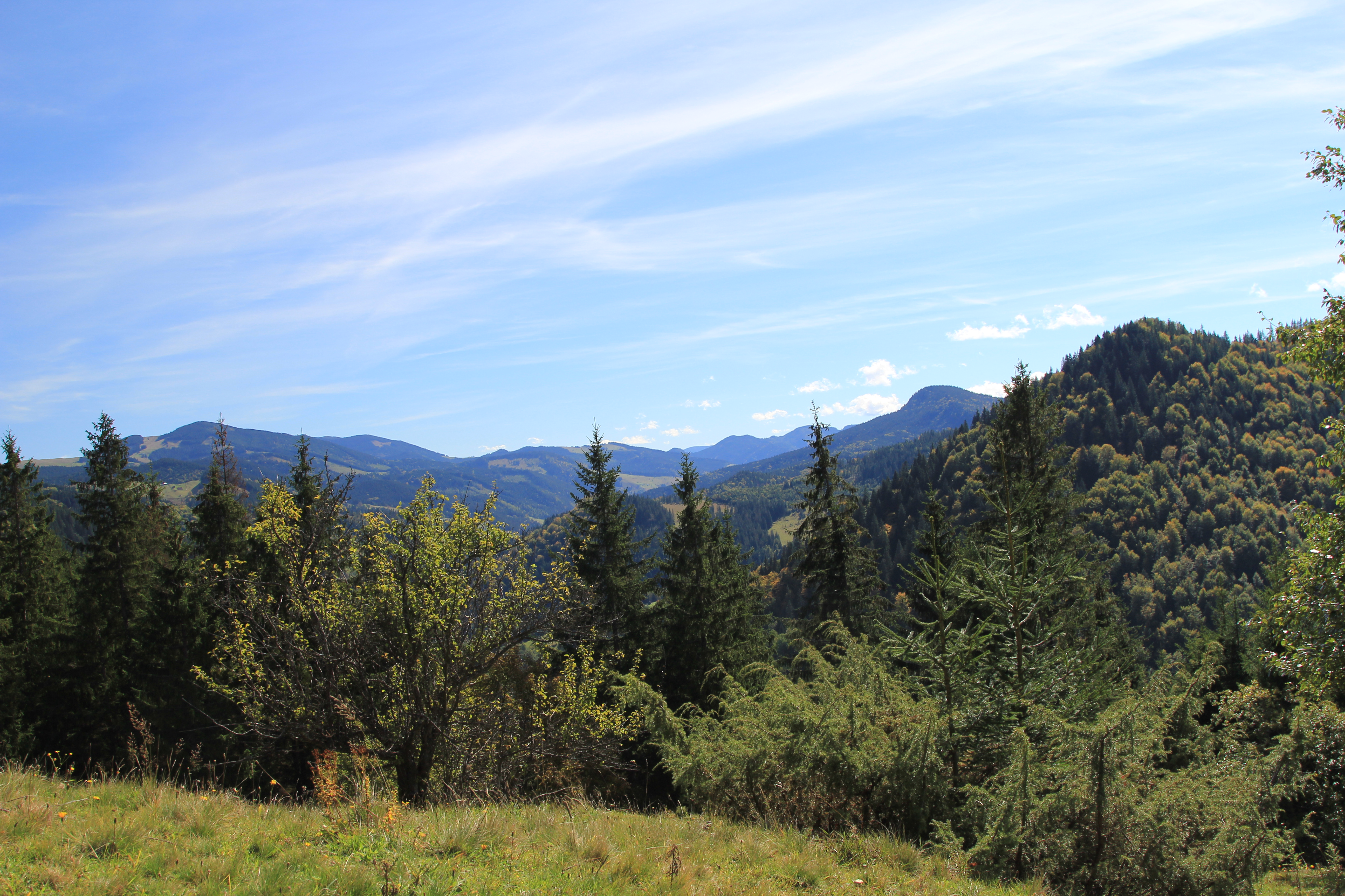 «Верховинський», Верховинський район